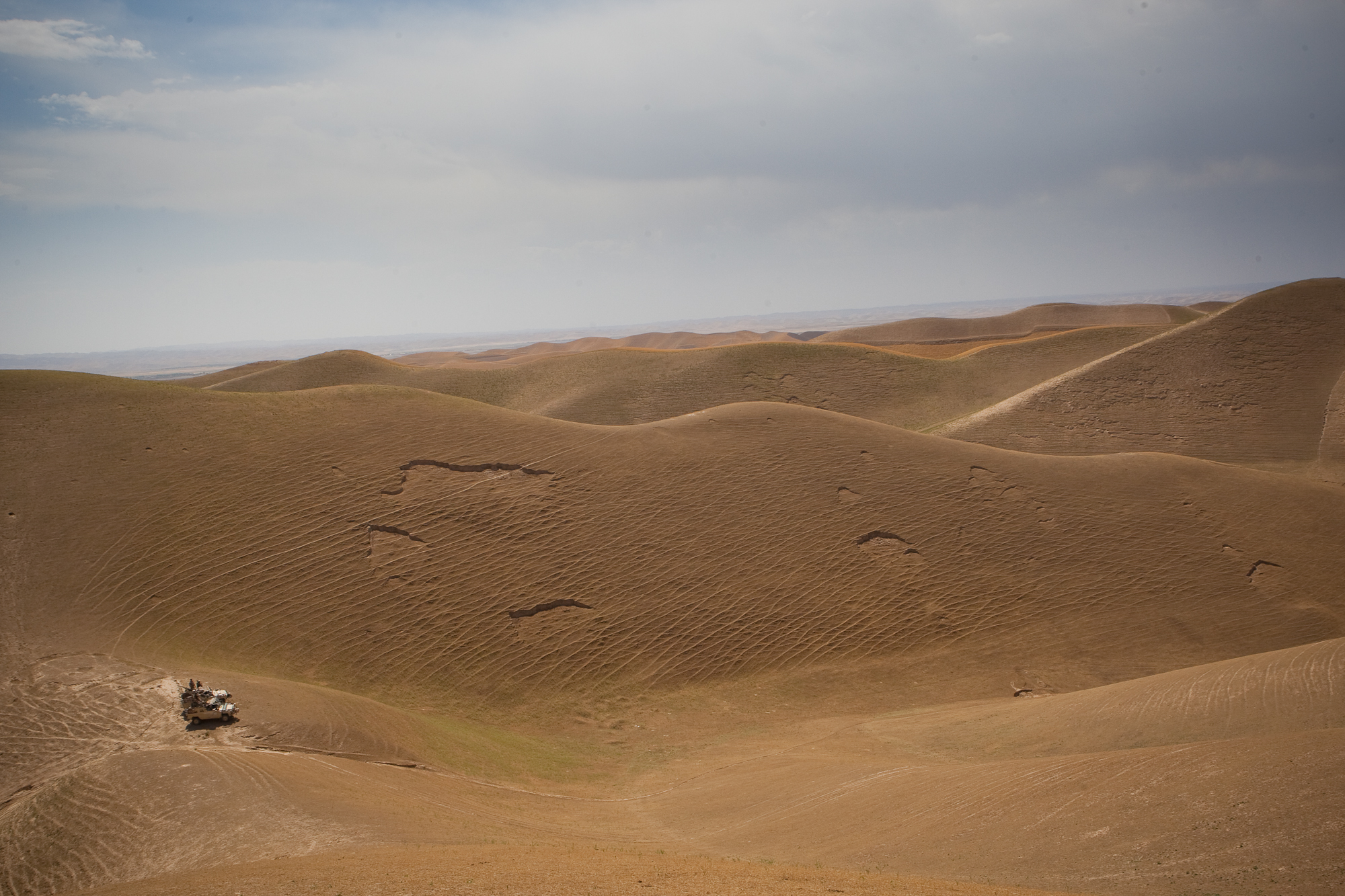 Outside in Faryab.